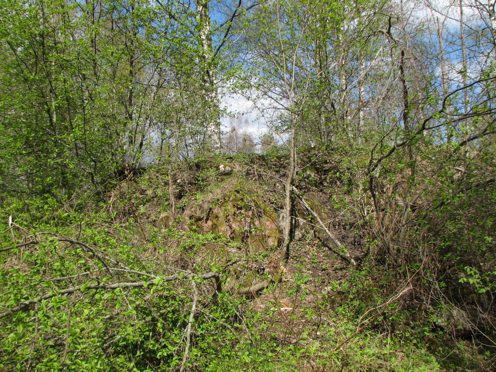 Tiversk